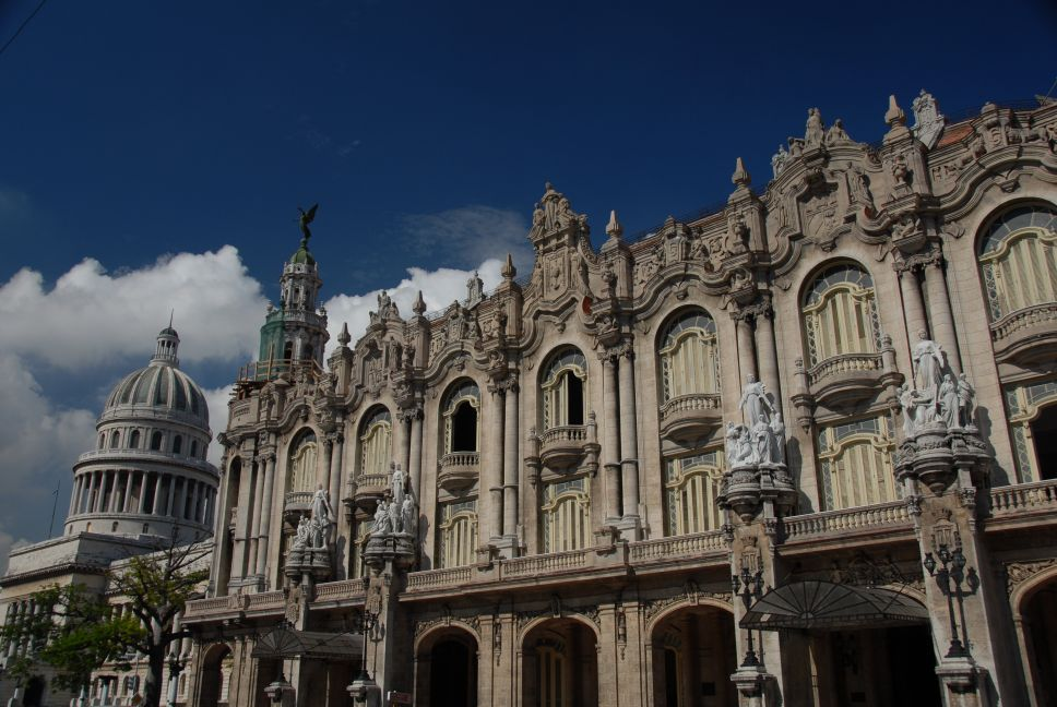 Cuba, augustus 2006, info in de Metadata